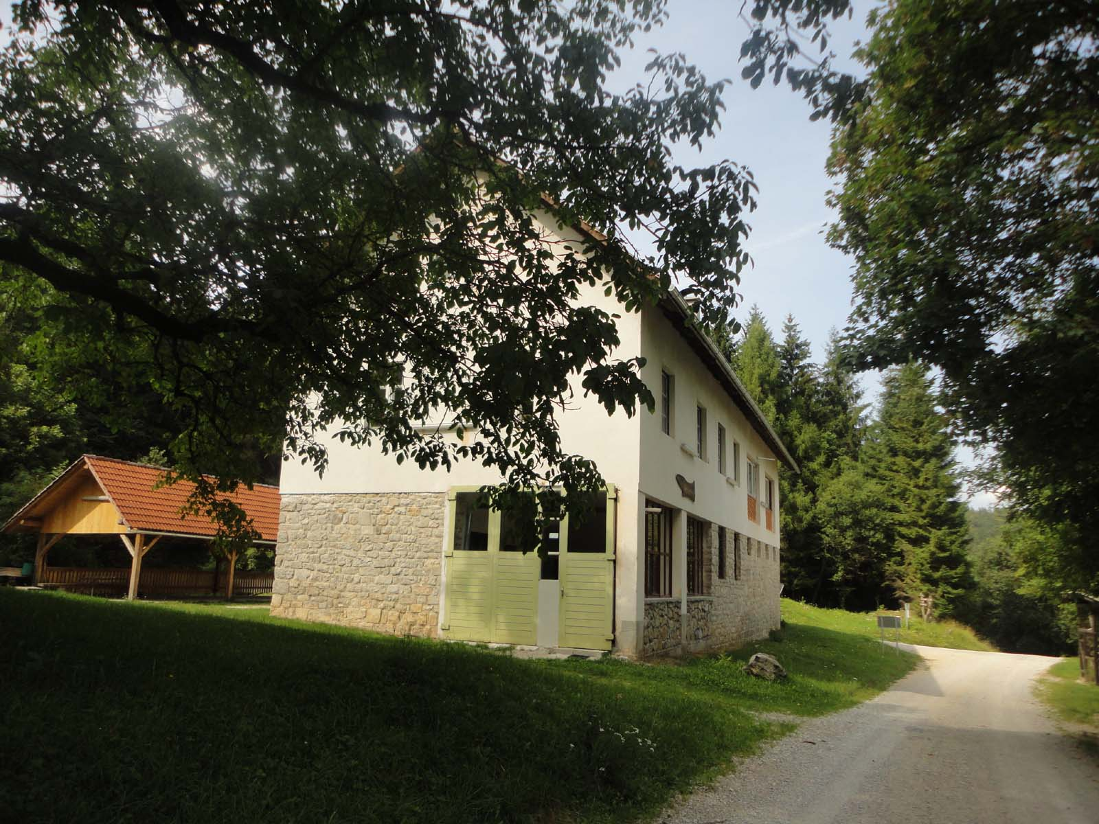 Čebelarski dom v Podstenicah